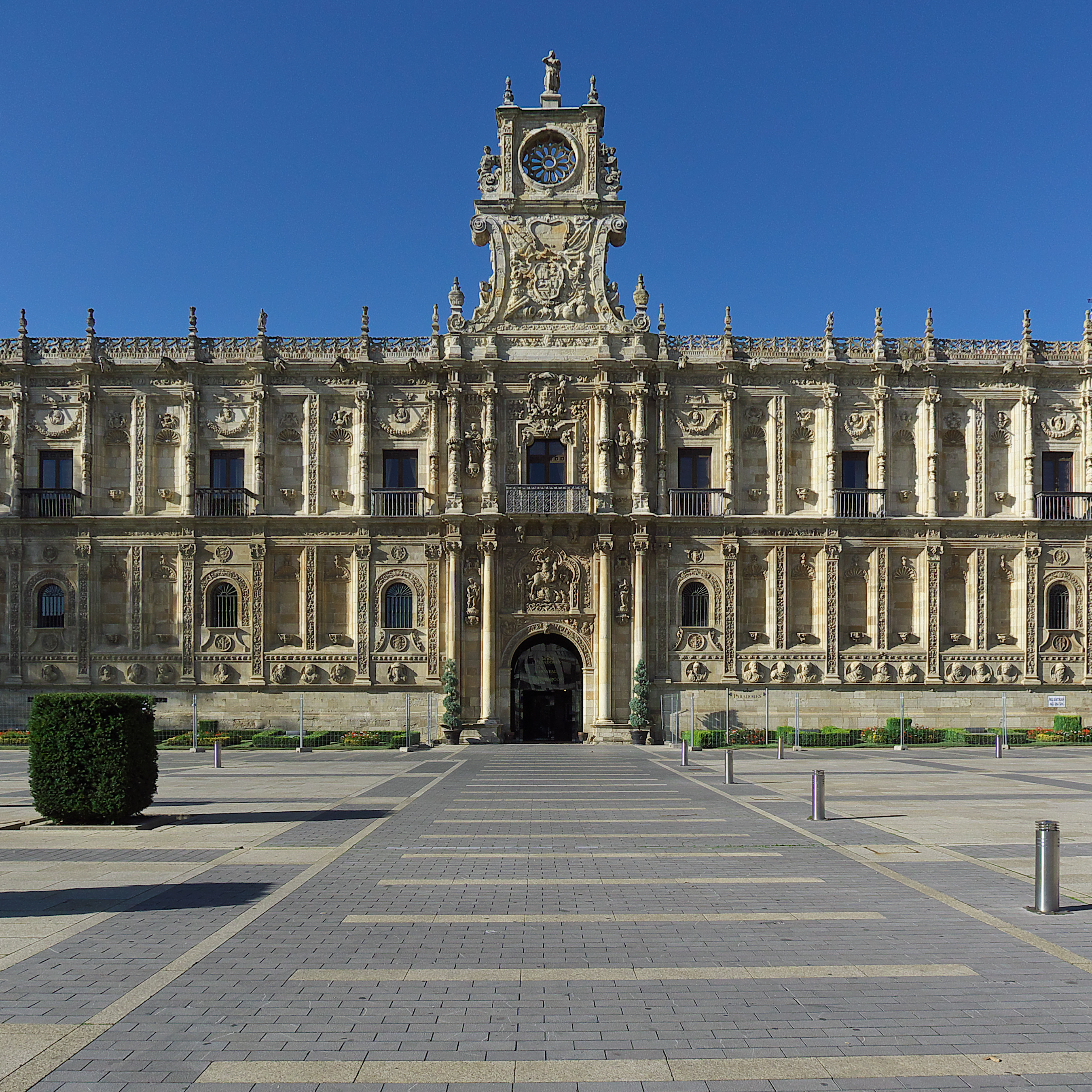 Portada principal del convento (1707-1714). Santiago, San Marcos, la Orden de Santiago, las Virtudes y el escudo real, componen la soberbia portada barroca.